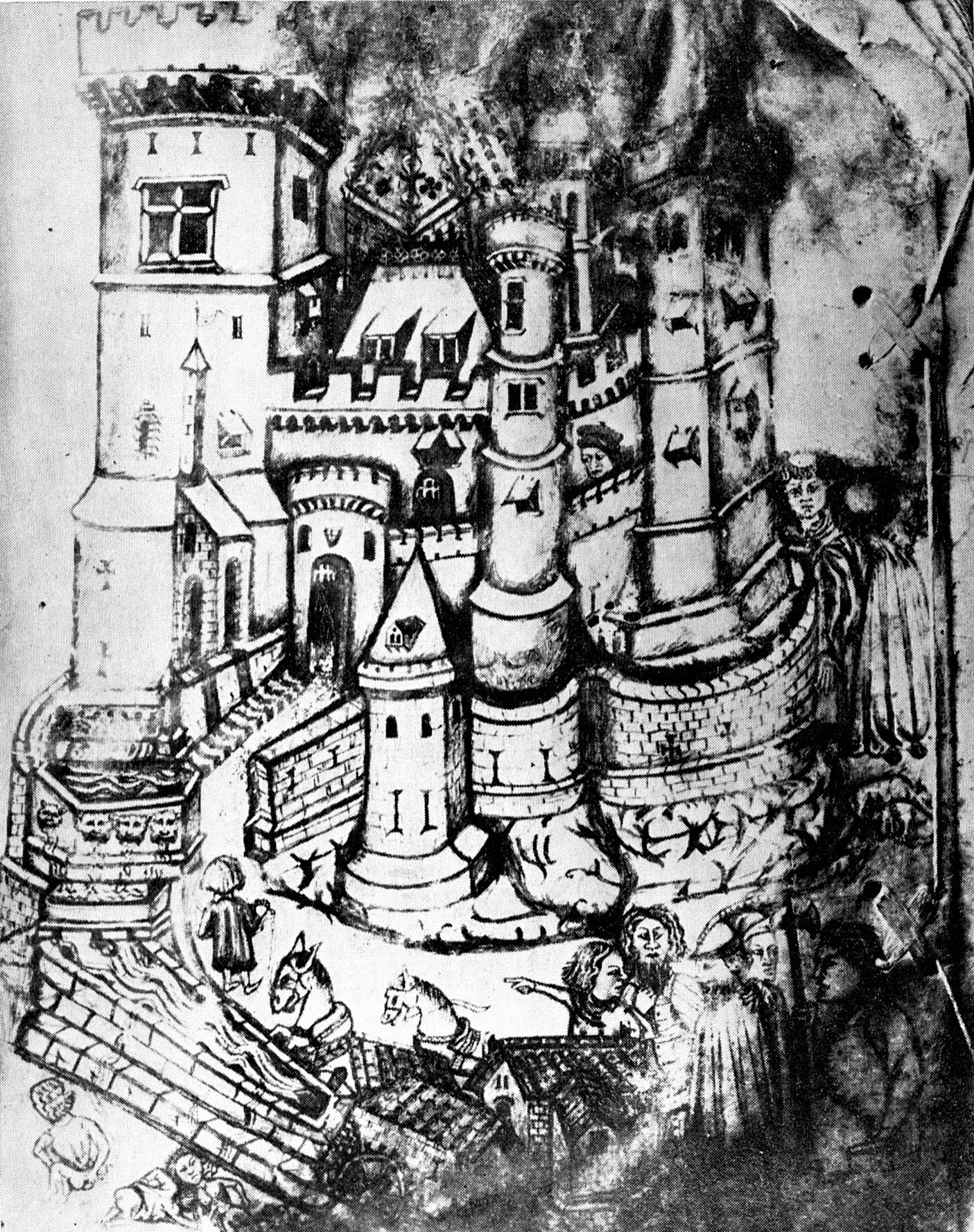 Représentation de la porte est de Lectoure, dite porte Matabiau, porte Boucouère, porte des Jacobins, XIVe siècle, archives municipales de Lectoure.